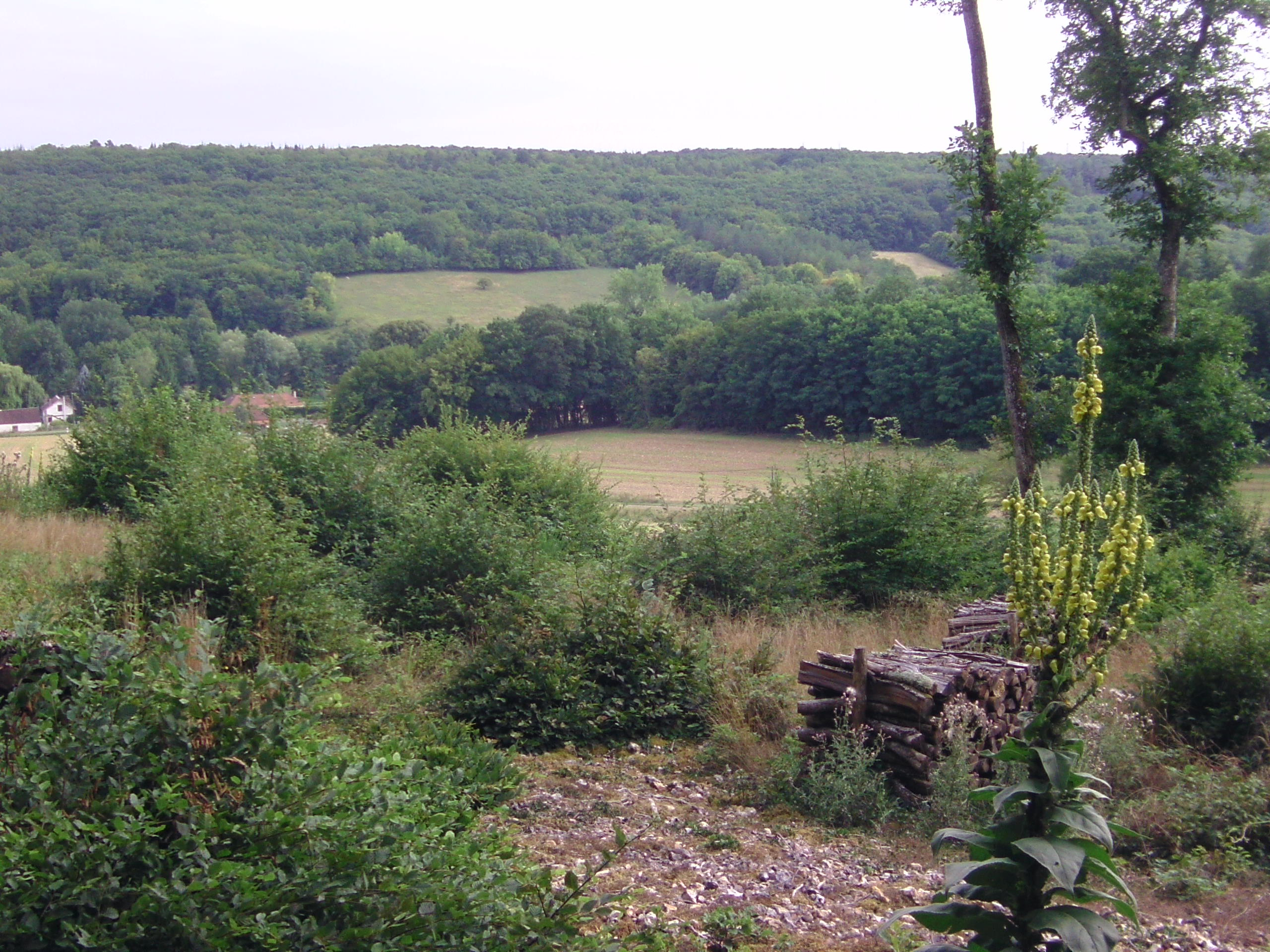 Vue des cultures de la vallée Dieu à Saint-Julien du Sault (Yonne) France